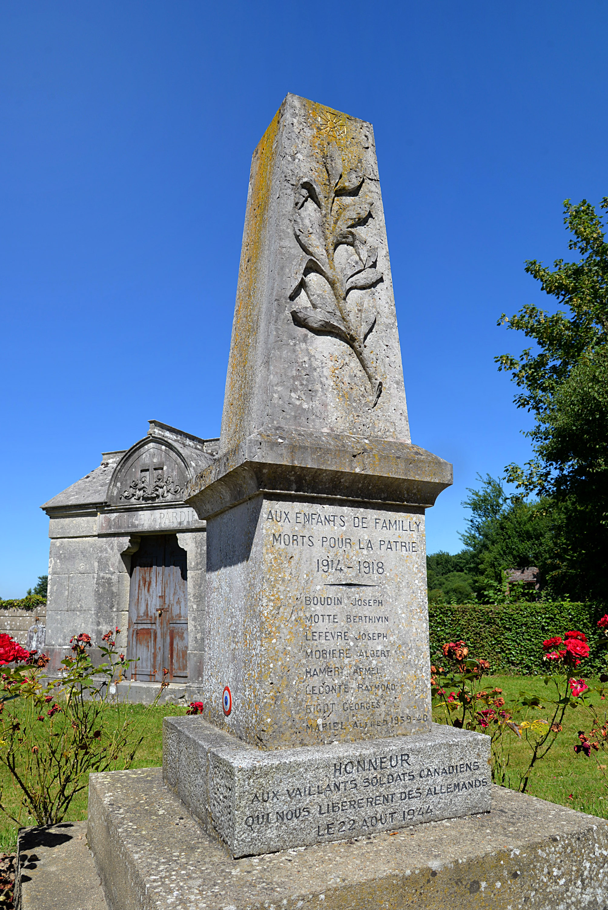 Familly (Calvados)